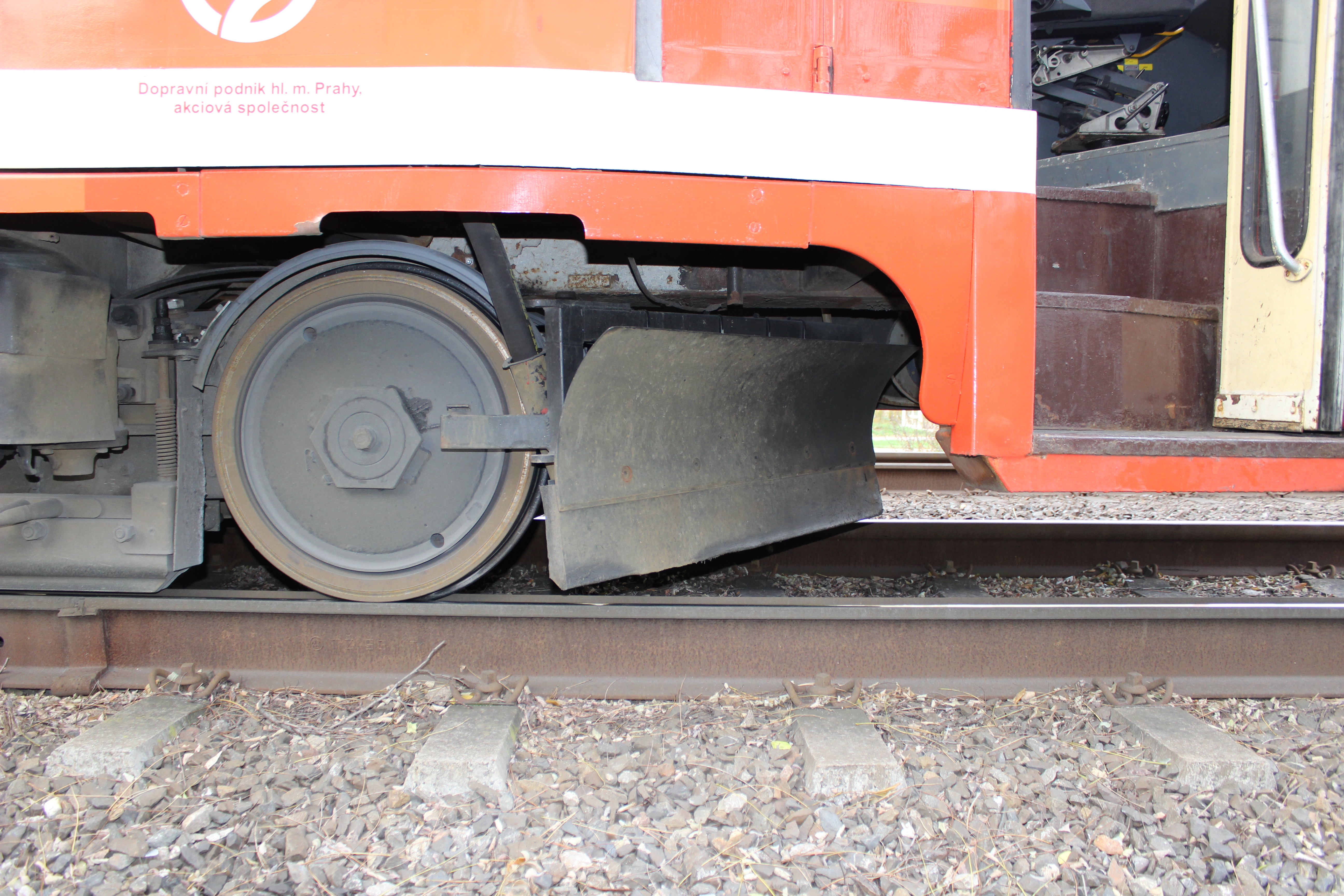 Pracovní tramvaj T3M evidenční číslo 5572. Vyfotografováno laskavostí pracovníků Dopravního podniku hlavního města Prahy – Milana Slunečka, Jiřího Štábla a Martina Brejši.